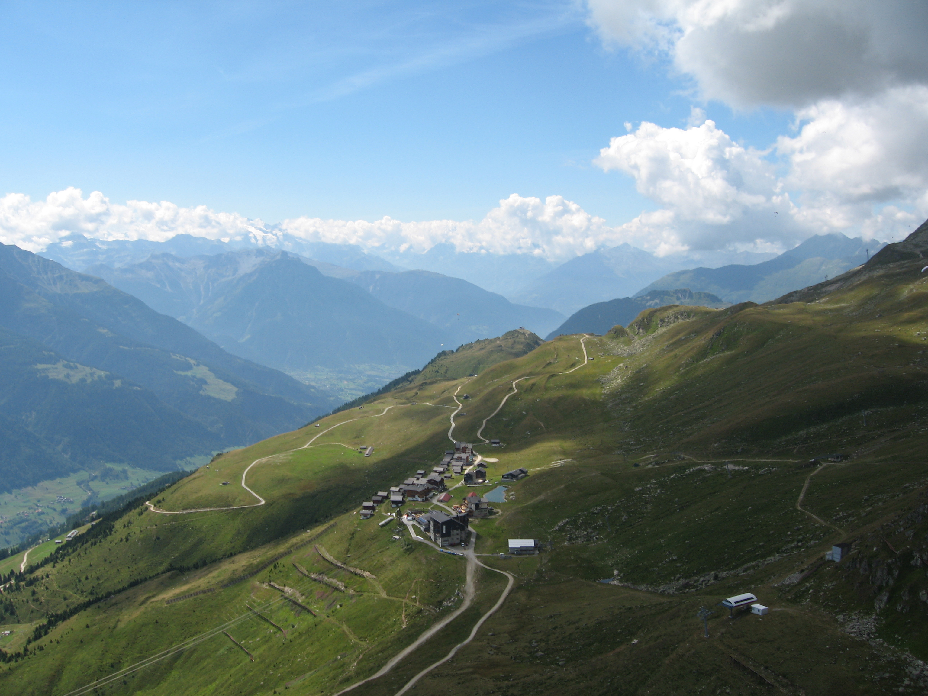 Blick von einem Gleitschirm aus Richtung Westen